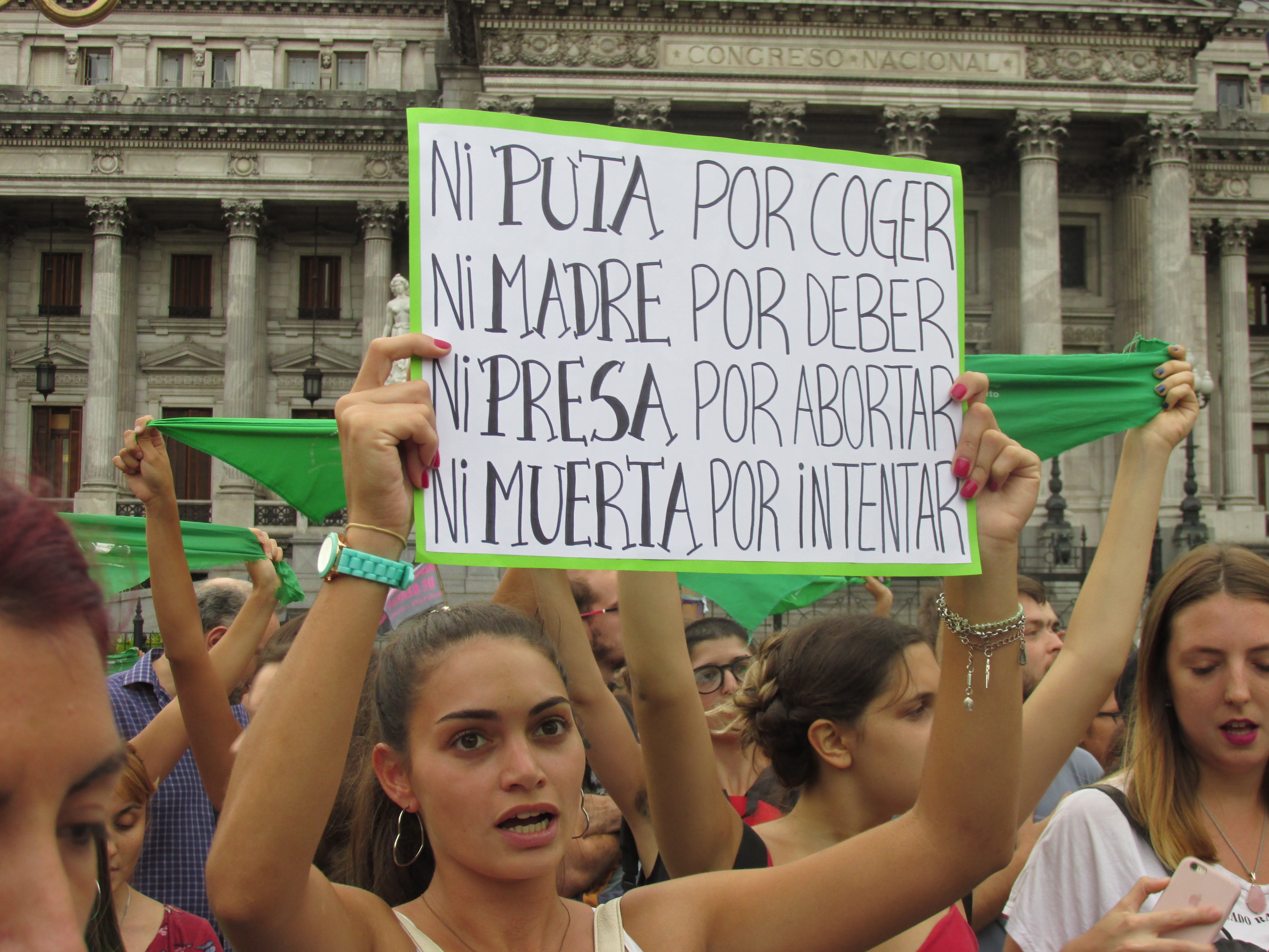 Tuitazo, y pañuelazo frente al Congreso de Argentina en reclamos de la aprobación de la ley de interrupción voluntaria del embarazo, bajo la consigna #AbortoLegalYa.